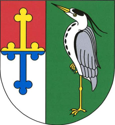 Volevčice, okres Most, znak